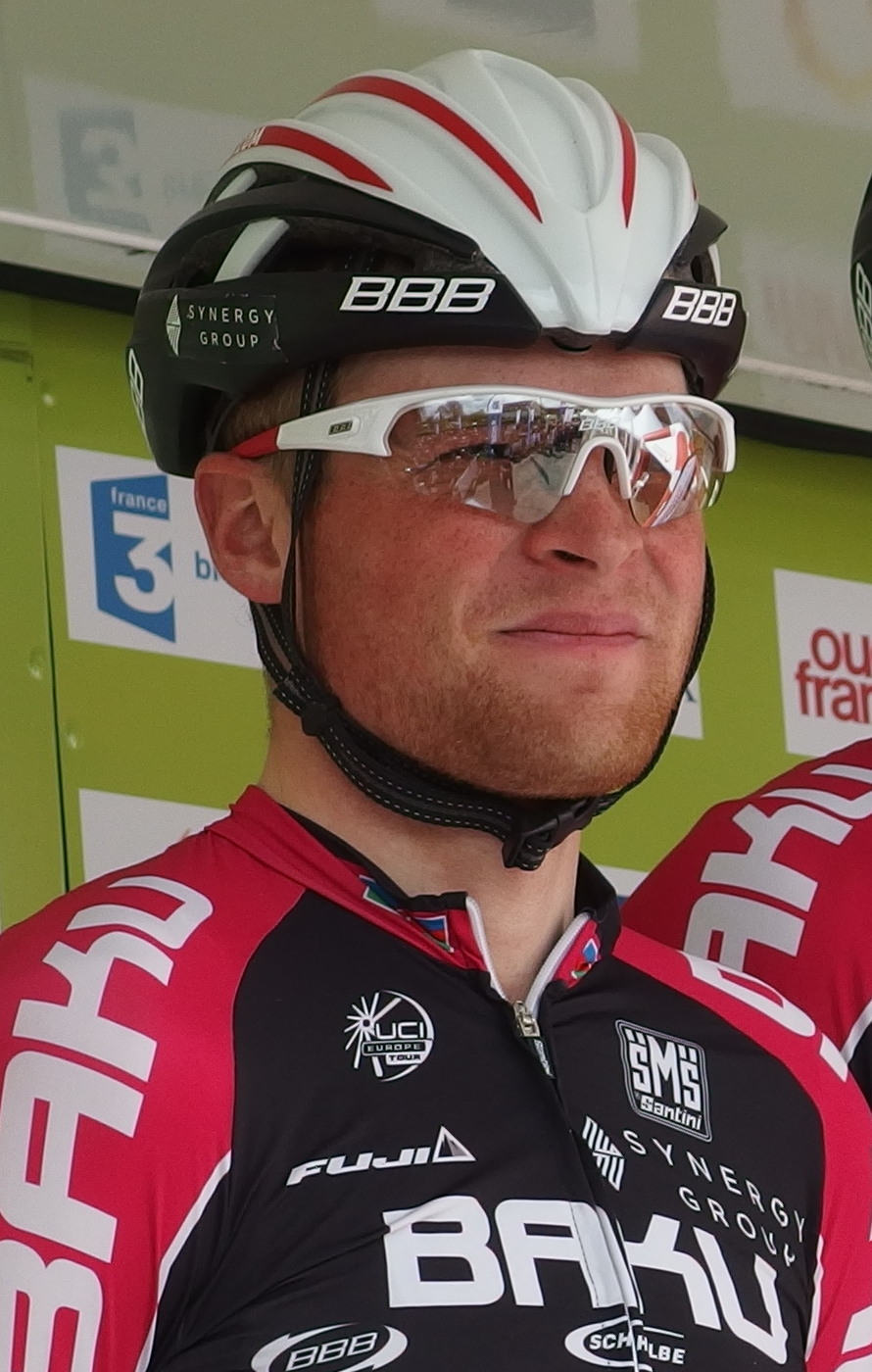 Tour de Bretagne 2014 - Présentation des équipes au départ de la sixième étape à Radenac - Équipe Synergy Baku Project Depicted person: Daniel Klemme